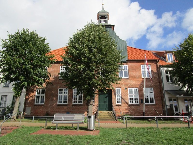 Skipperhuset ved Tønning havn